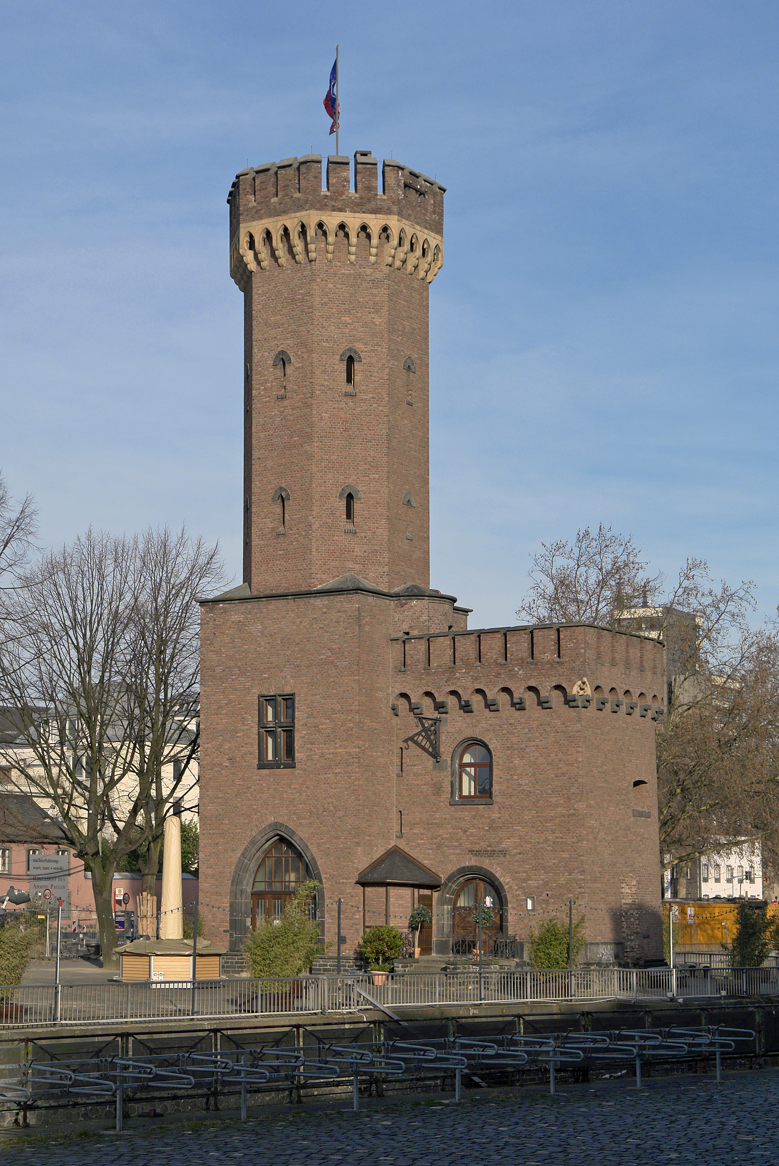 Malakoffturm am Kölner Rheinau-Hafen